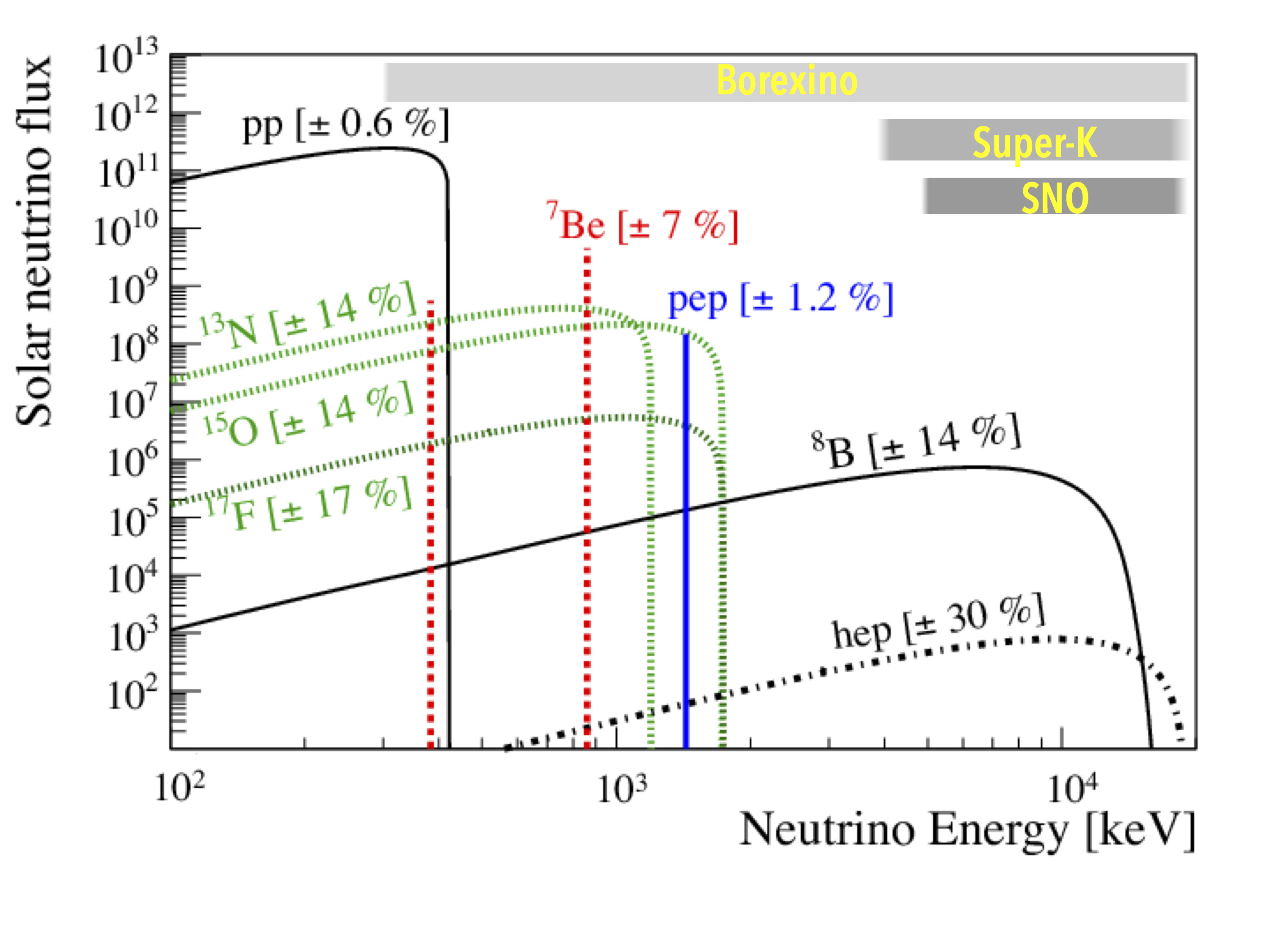 Le bande grigie mostrano le regioni di sensibilità dei tre rivelatori di neutrini solari che sono in grado di ricostruirne l'energia degli eventi. Si noti che Borexino e' potenzialmente in grado di vedere tutti i principali tipi di neutrini solari previsti dai modelli solari, mentre Super-Kamiokande e SNO possono osservare solo una piccola frazione (circa 0.02%) del totale.